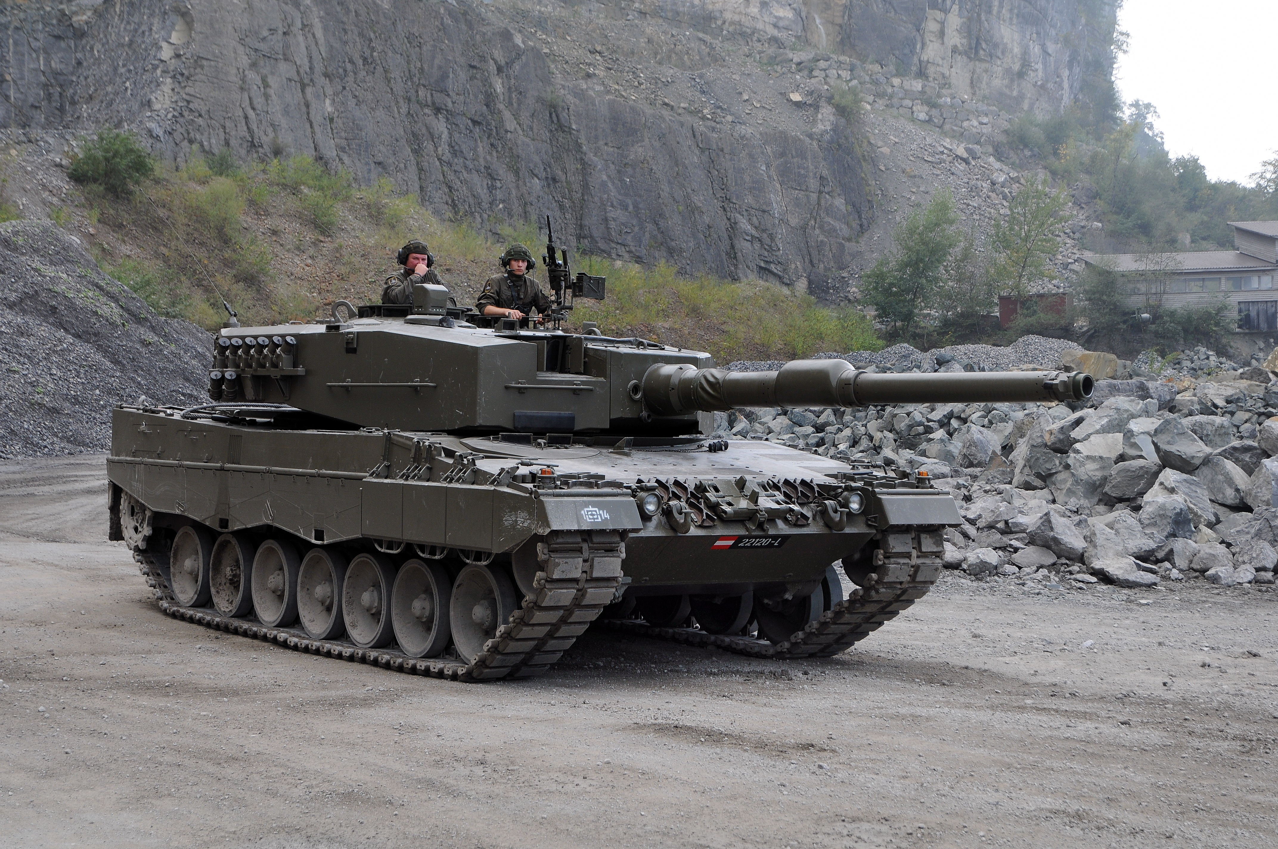 Im Zuge einer Road-Show zeigte das Österreichische Bundesheer im Dornbirner / Hohenemser Steinbruch den Kampfpanzer Leopard 2A4. Er ist das Hautwaffensystem der österreichischen Panzertruppe. Als Hauptwaffe verfügt der Panzer über eine 120 Millimeter Kanone. Die starke Motorisierung sorgt trotz der starken Panzerung für die enorme Beweglichkeit des Fahrzeuges.